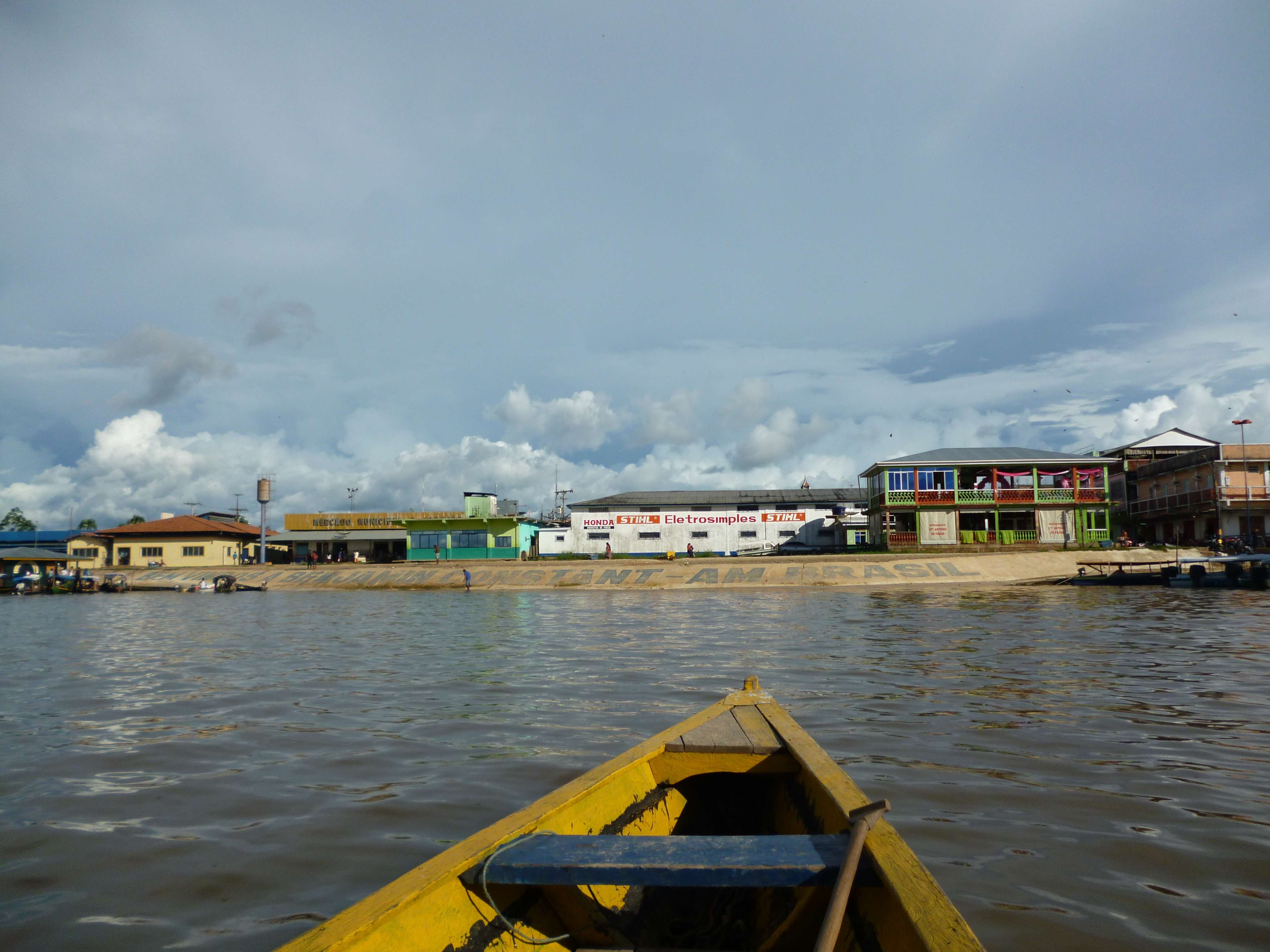 Vista de Benjamin Constant desde el Amazonas